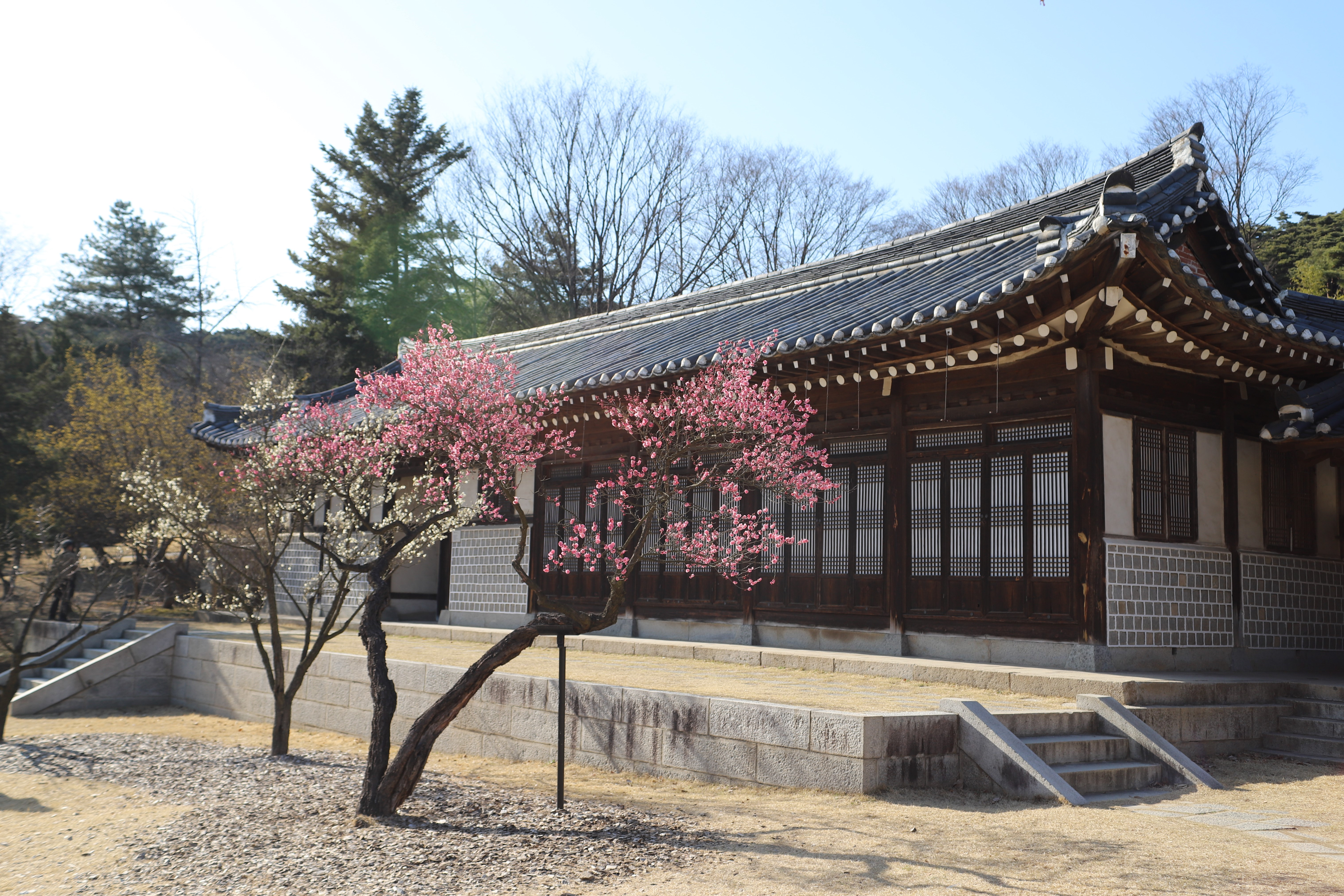 현충사고택에 피어오른 홍매화